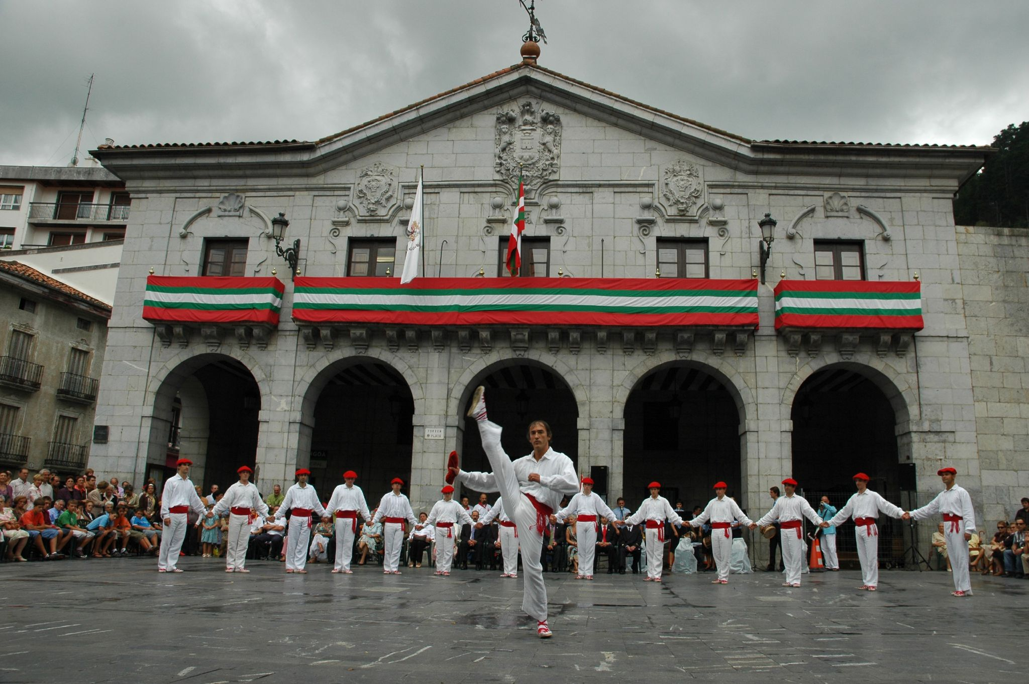 Soka-dantza Elgoibarko udaletxearen aurrean